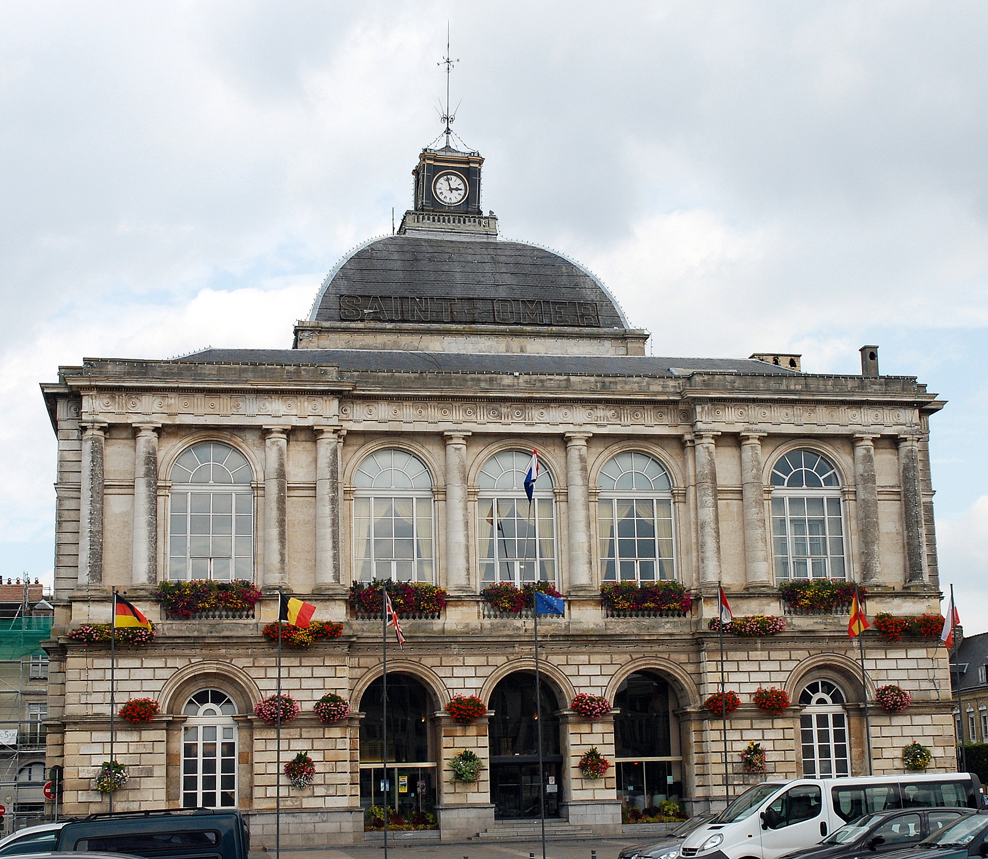 het gemeentehuis van Saint-Omer (Sint-Omaars) in Pas-de-Calais